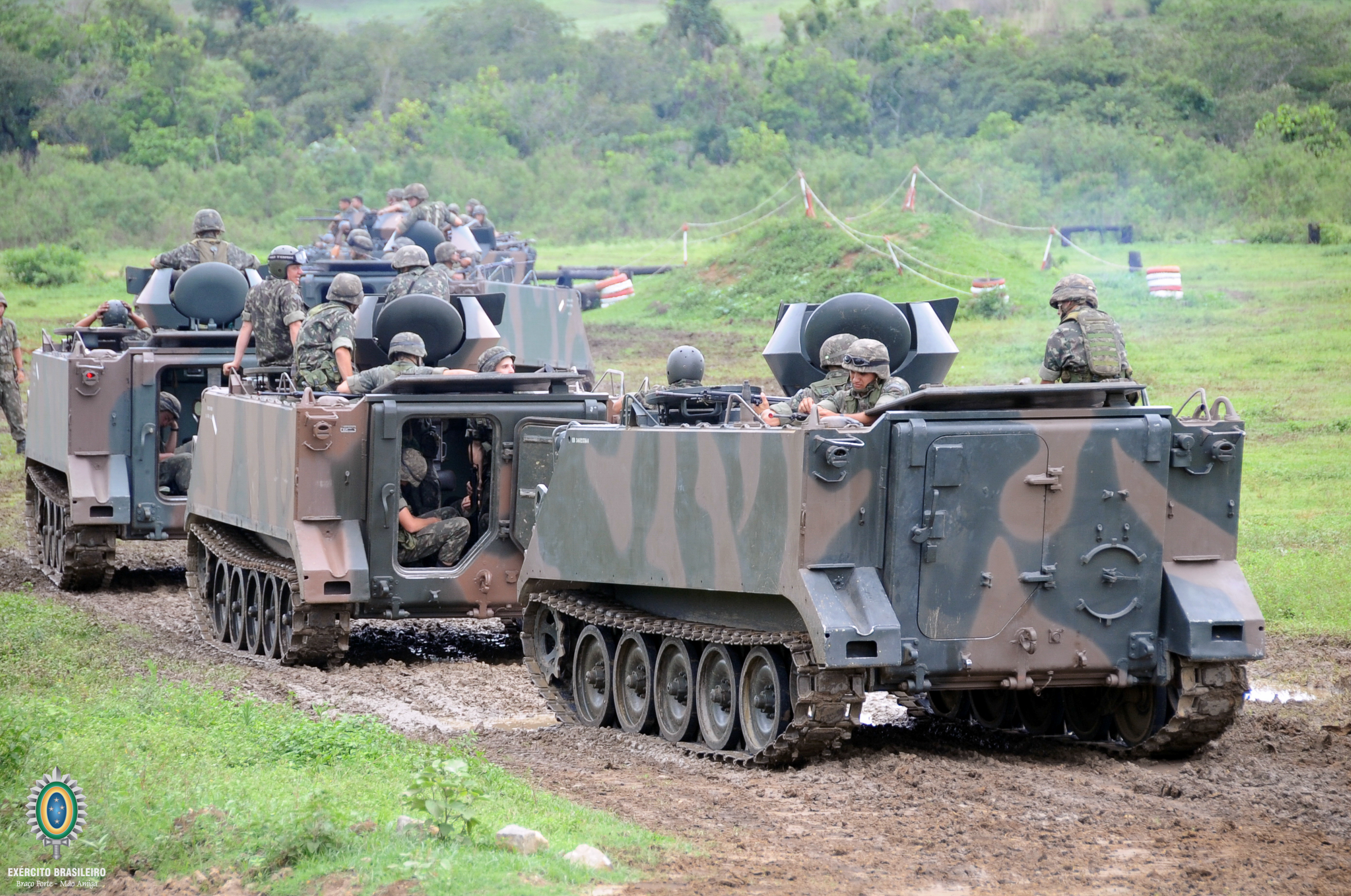 Cavalaria